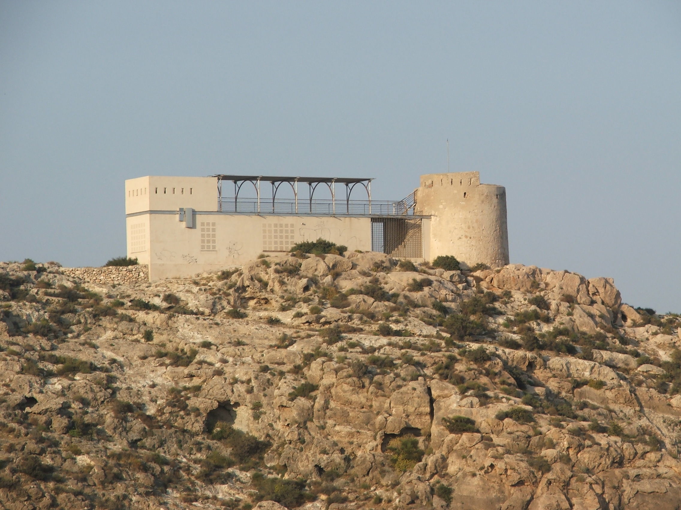 Fotografía de la torre vigía de la Garrofa, Almería, Andalucía, España, desde su lado oeste.